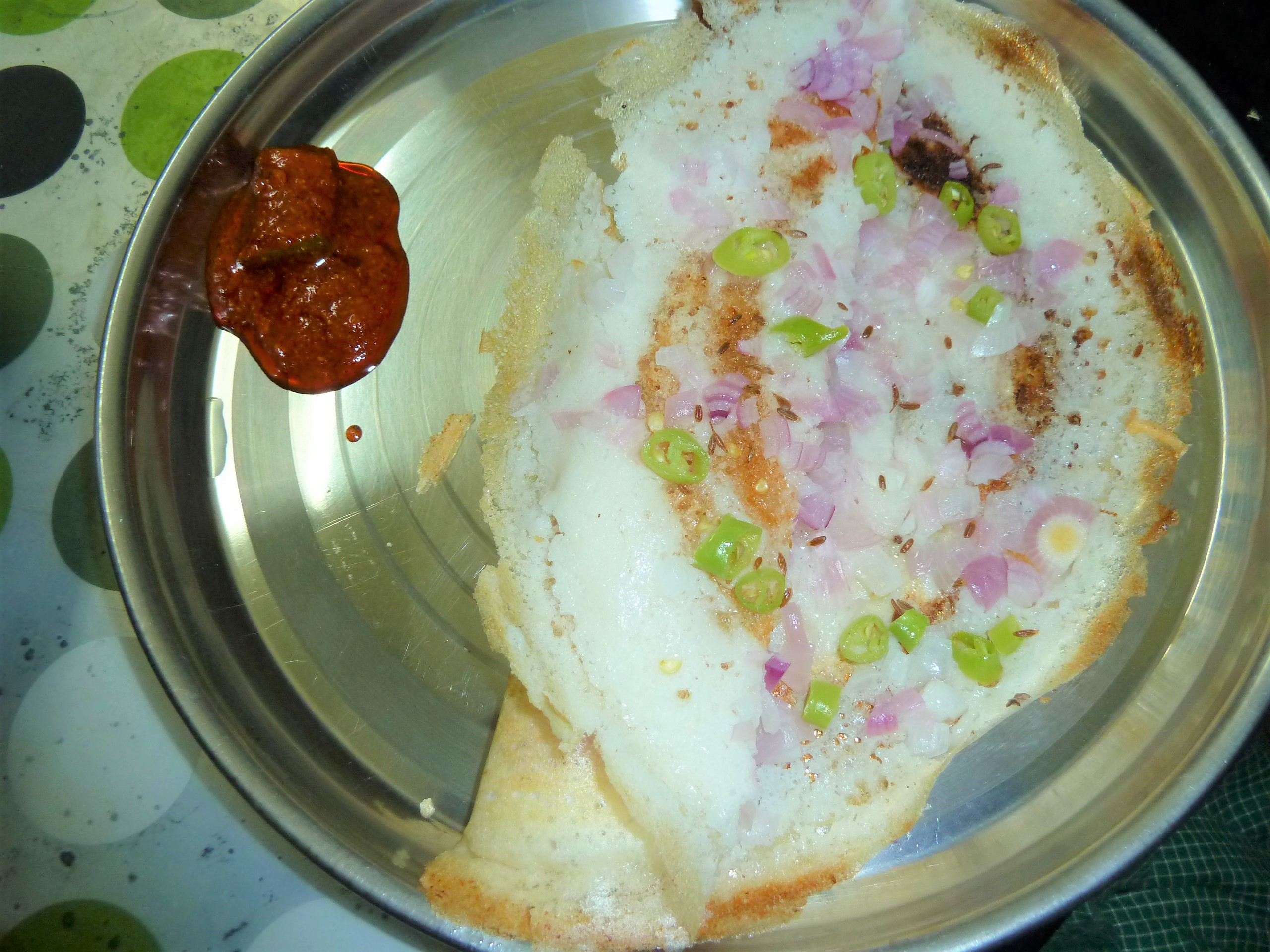 ఉల్లిపాయ అట్టు